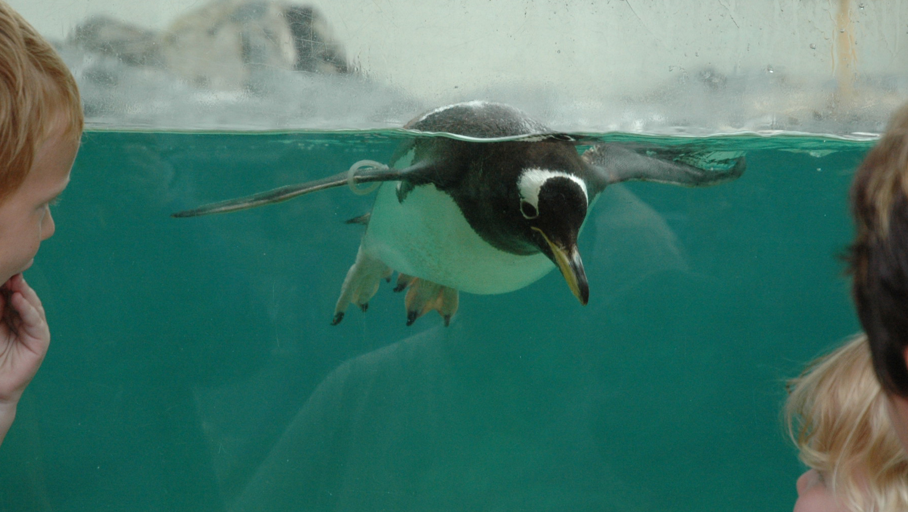 Pingvin i Akvariet i Bergen